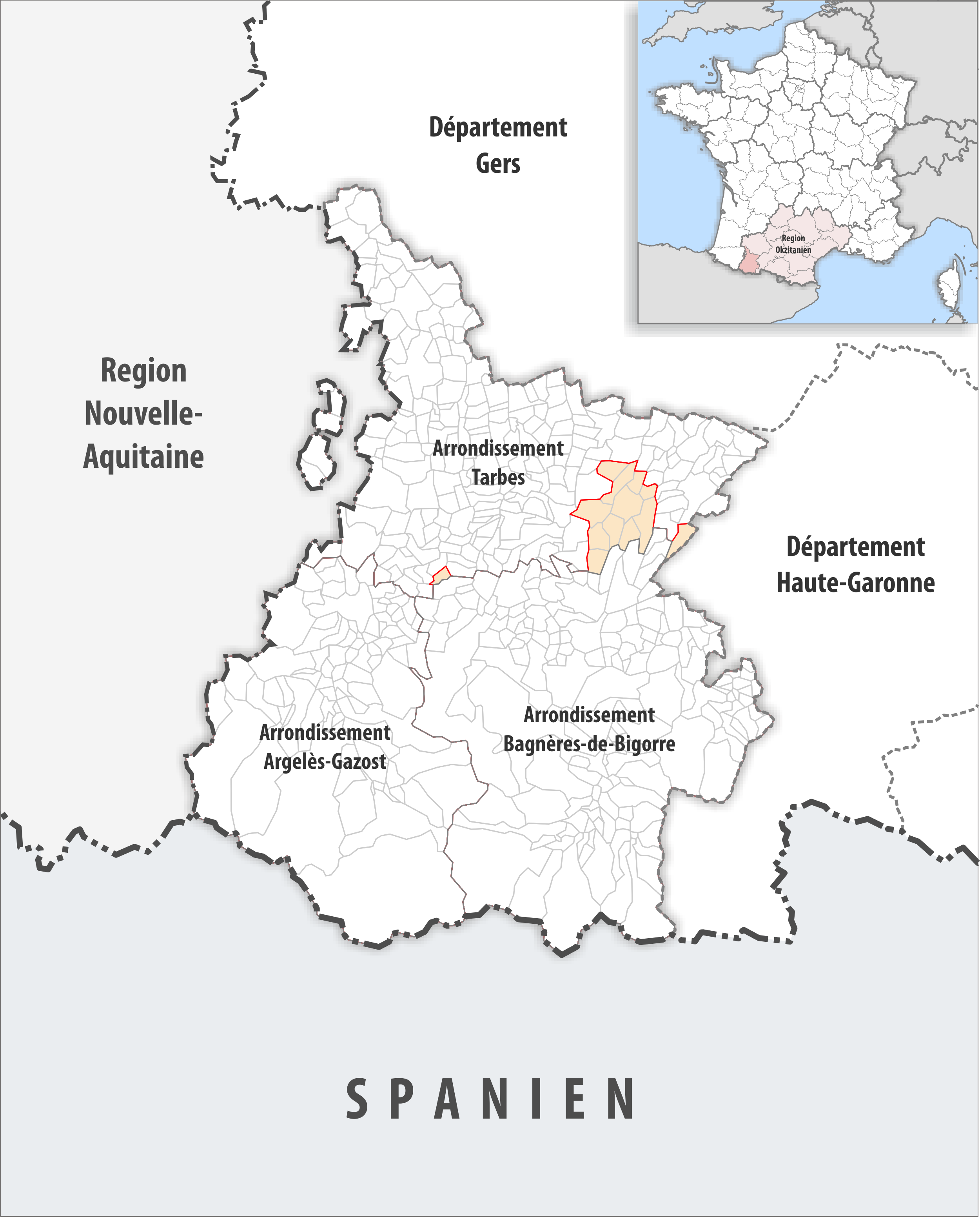 Arrondissements Anpassungen auf 2017 im Departement Hautes-Pyrénées